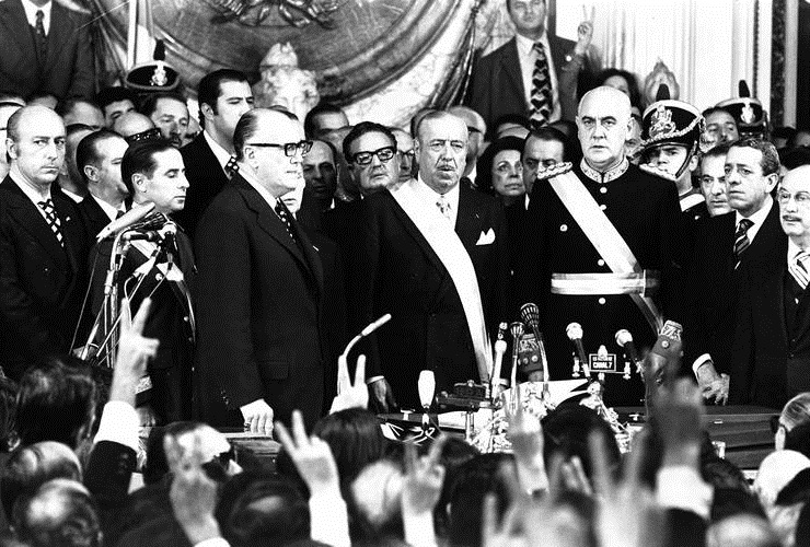 El dictador Agustín Lanusse junto al recién asumido Presidente Héctor Cámpora (1973).